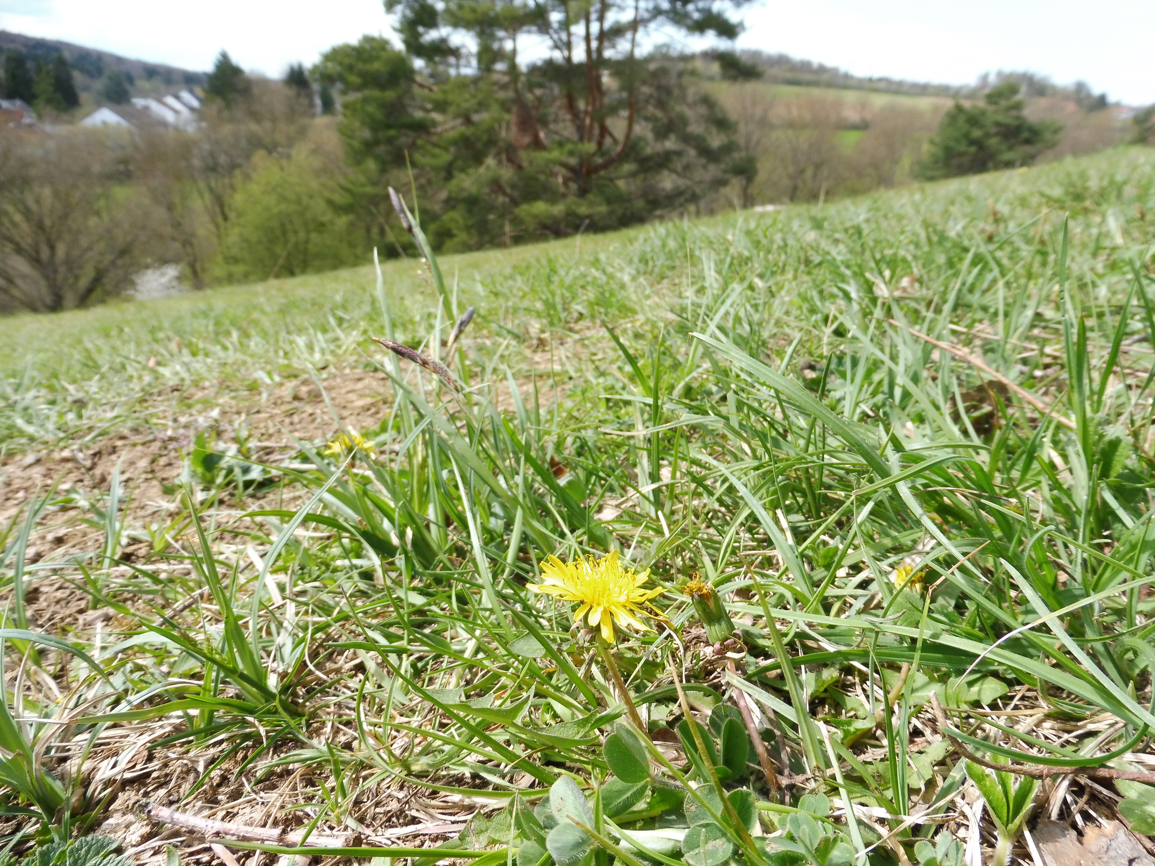 Pflaumenfarbener Löwenzahn (Taraxacum bellicum) Eichenhain Stuttgart-Riedenberg 14. April 2018